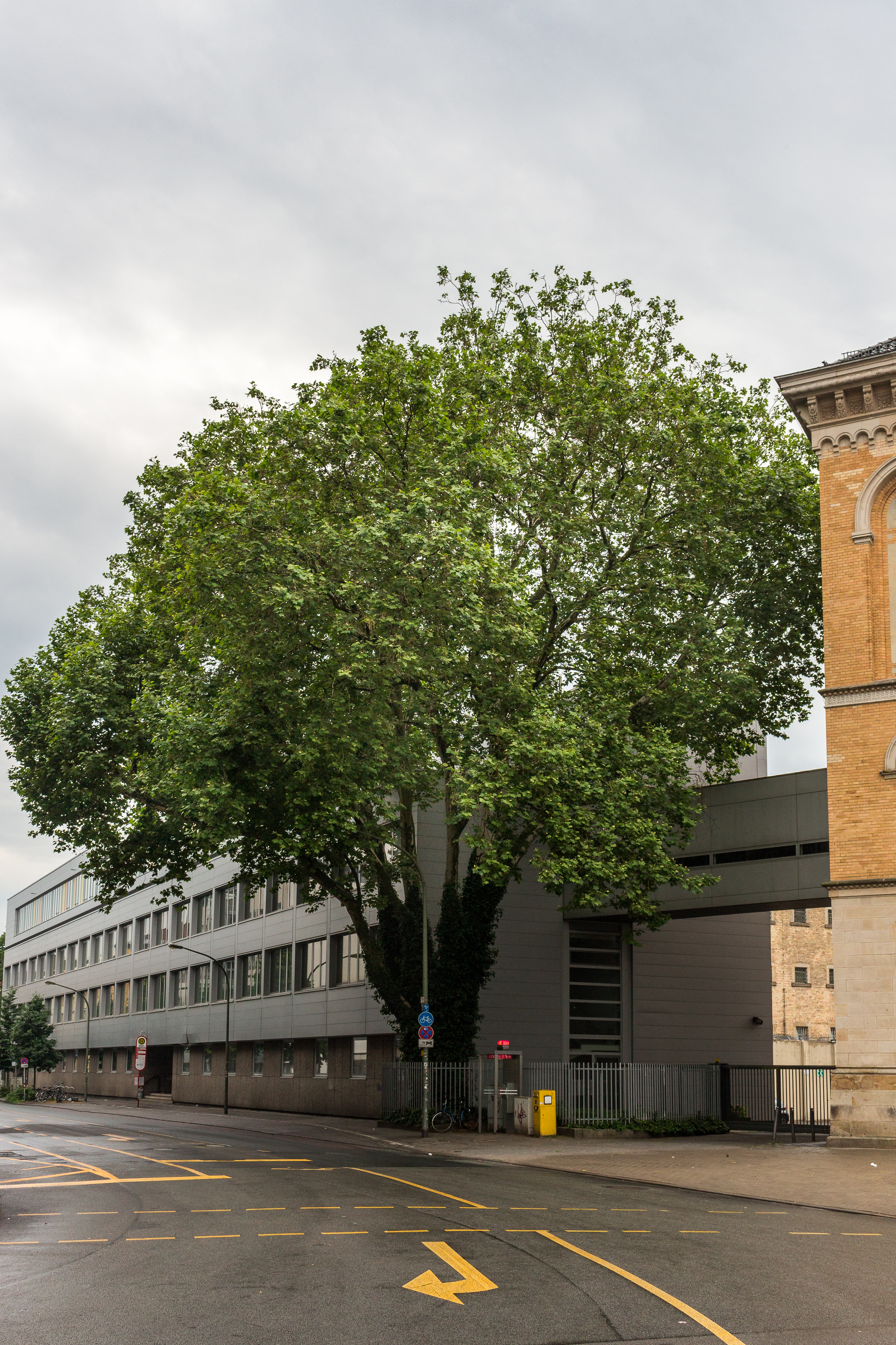 Platane-Landgericht ND-OS-S 01 Naturdenkmal in Osnabrück Kontakt